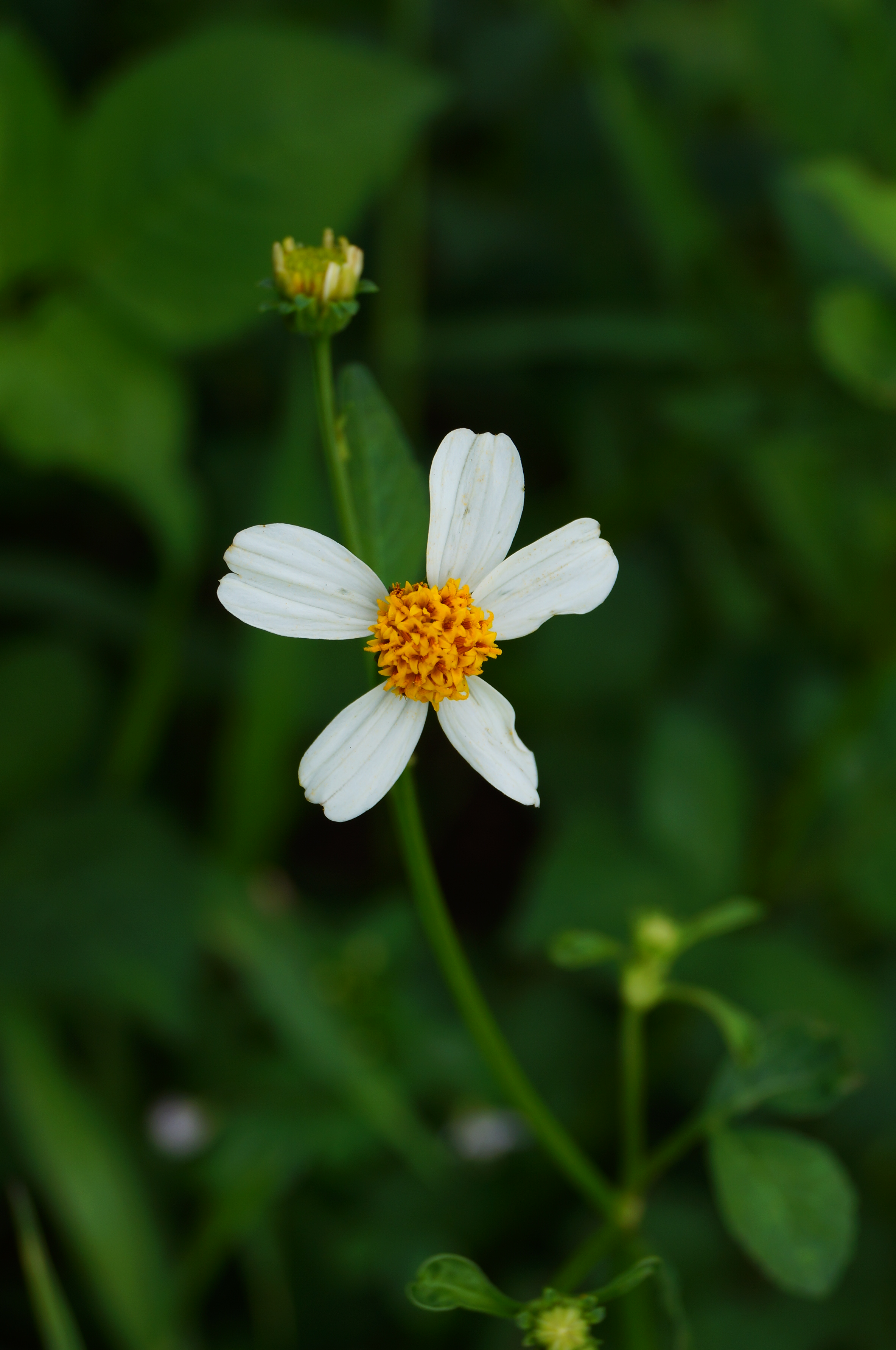 Bidens pilosa L., 1753Tiếng Việt: Xuyến chi